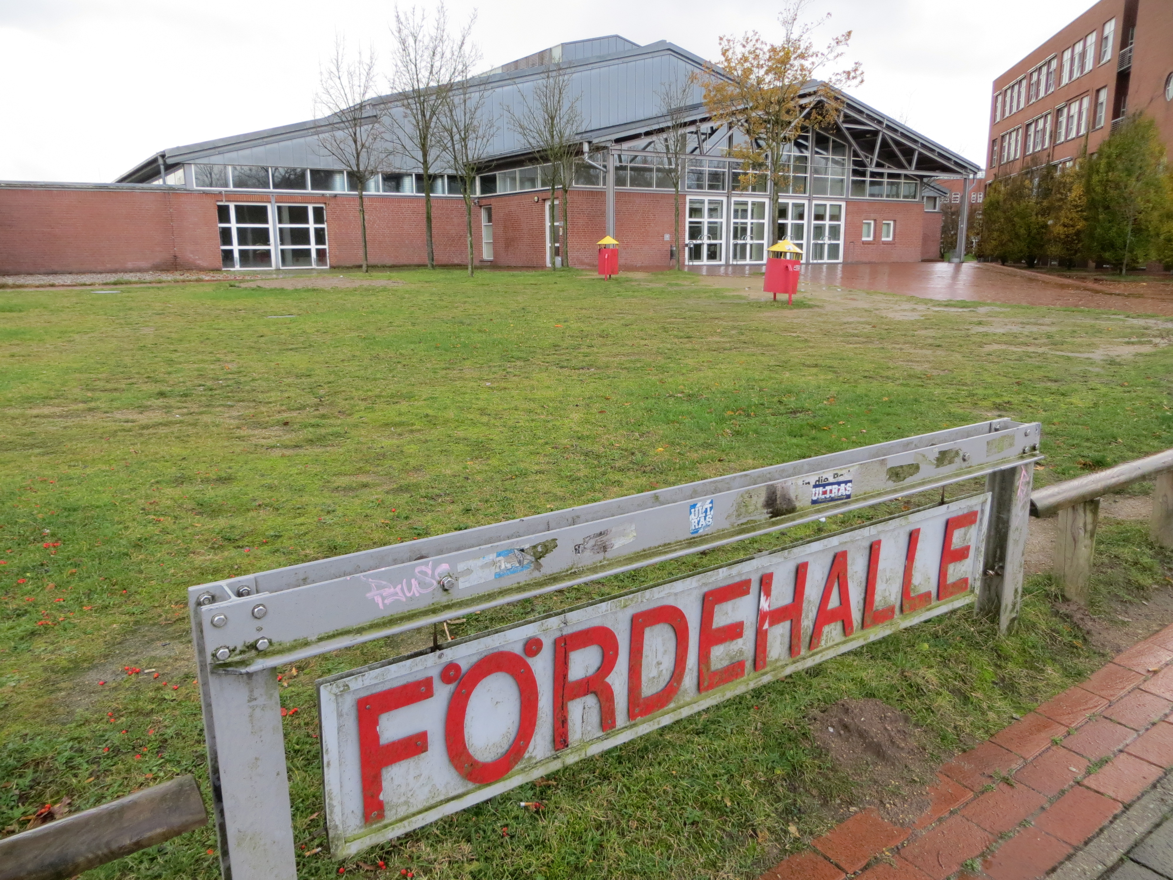 Fördehalle (Flensburg), Bild 02